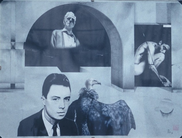 Drawing